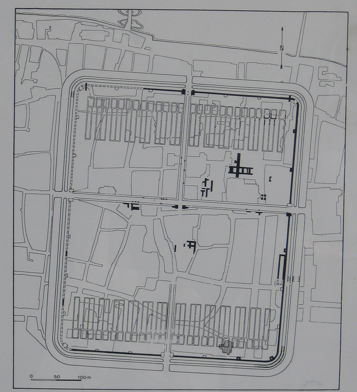 Plan von Castra Regina